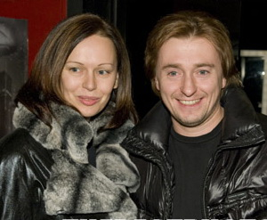 Ирина и Сергей Безруковы на премьере фильма «На игре»